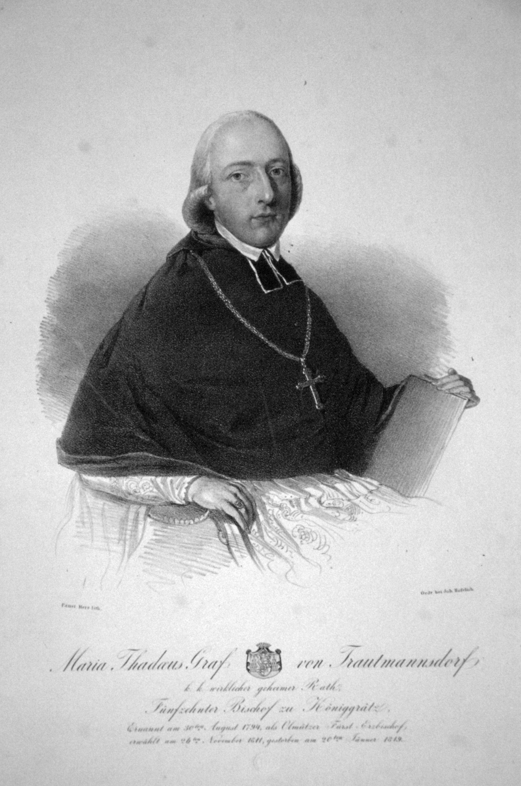 Maria Thadäus Trauttmansdorff, Lithographie von Faustin Herr